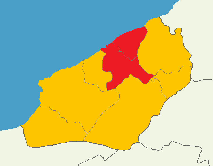 Zonguldak'ta 2014 Türkiye cumhurbaşkanlığı seçimi sonuçları